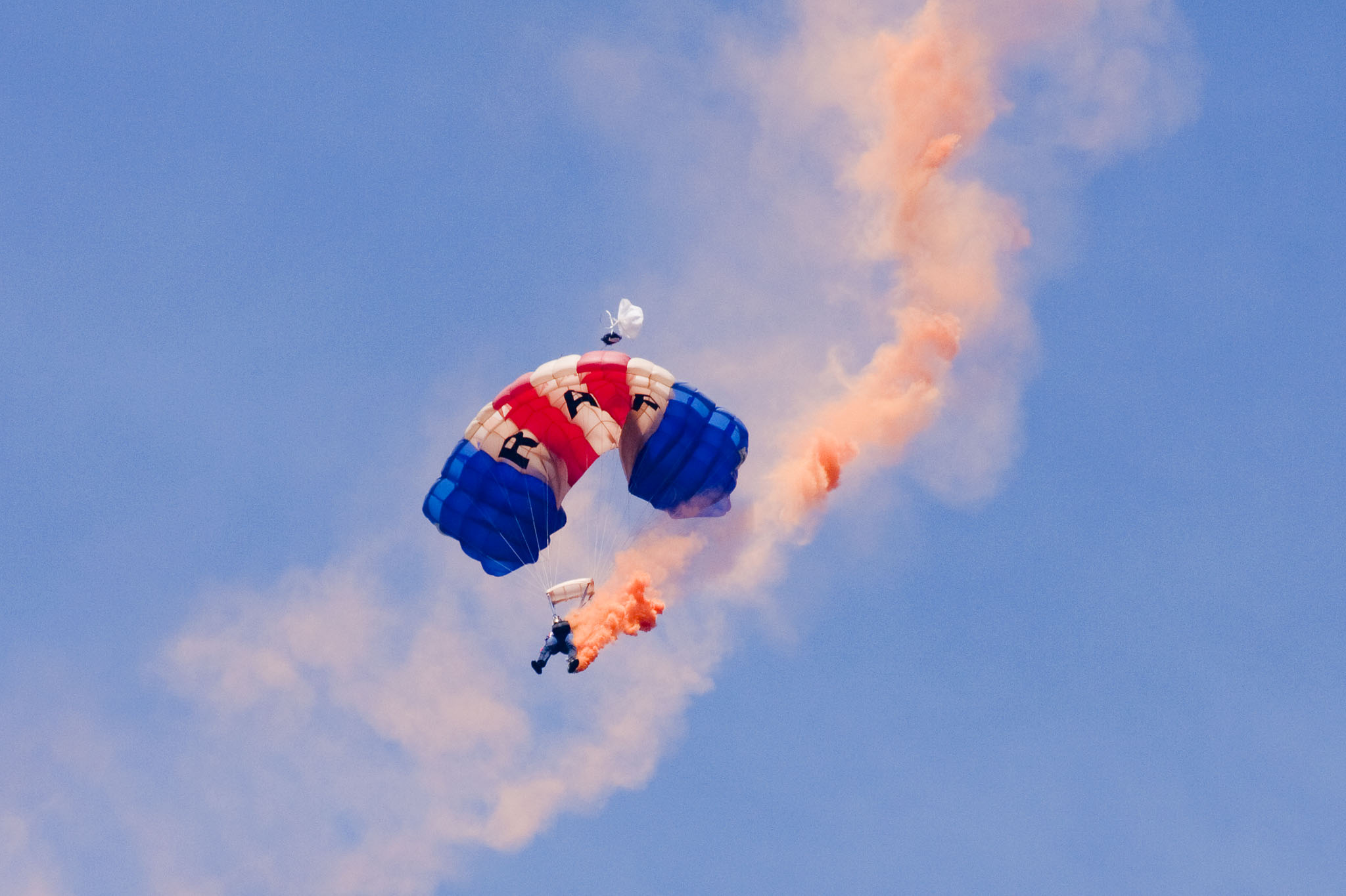 RAF Falcons 2